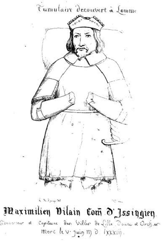 Maximilien de Gand Comte d'Isenghien - Tumulaire en l'église de Lomme